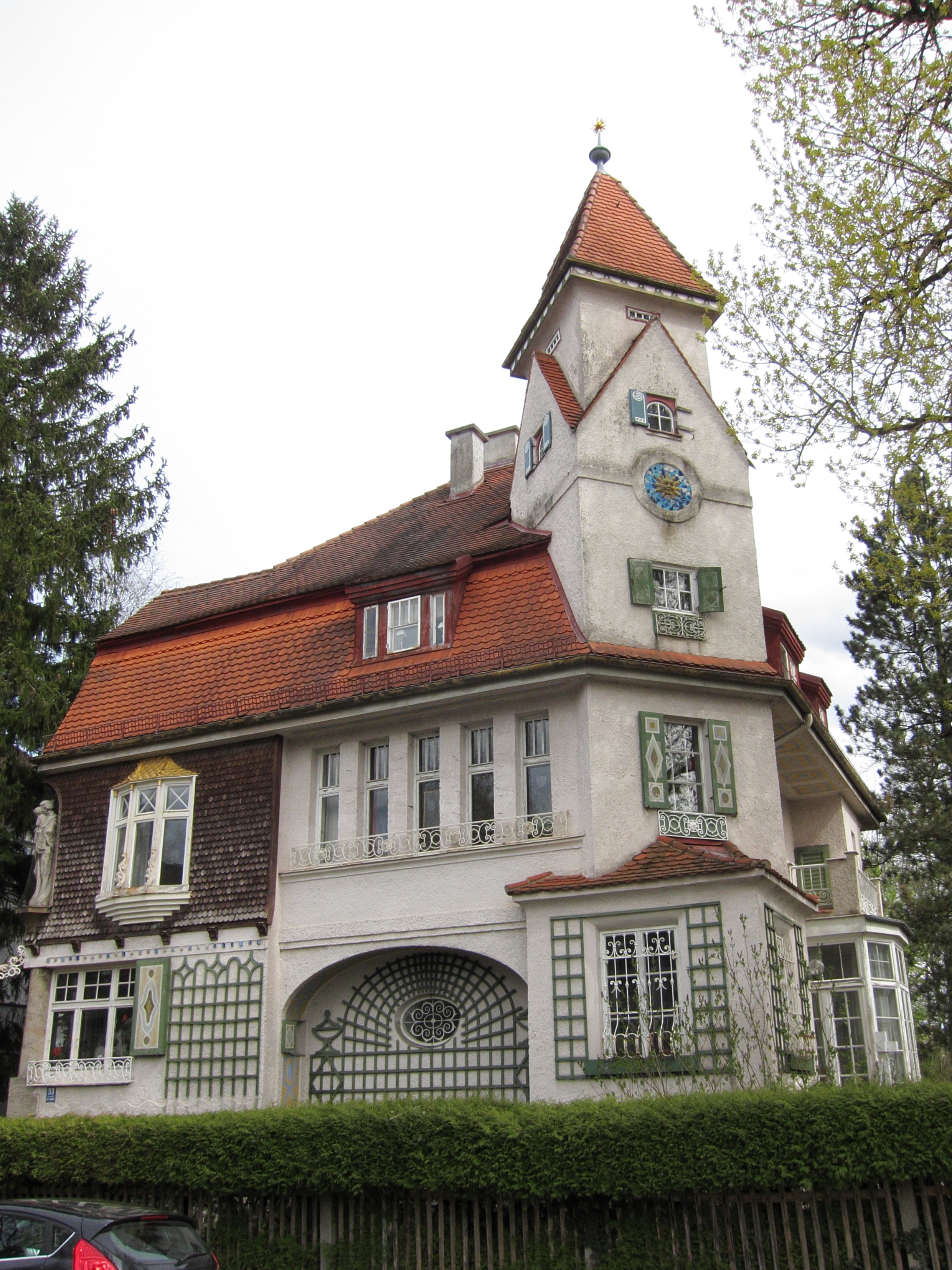 Am Stadtpark 53; Villa, malerisch gruppierter Bau, historisierender Jugendstil, 1909 von Josef Schormüller.